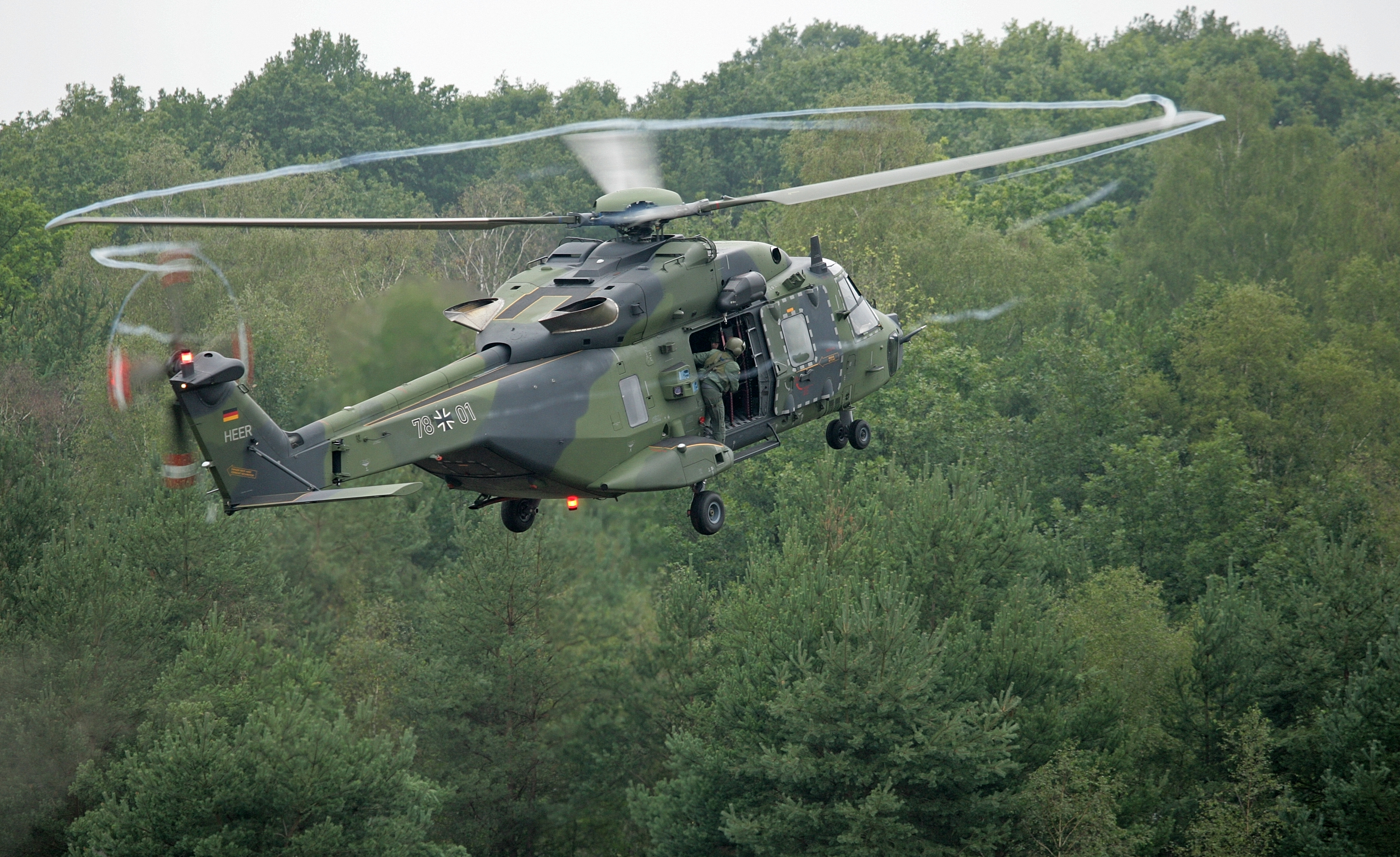 Landung des Mehrzweckhubschrauber NH90 auf dem Truppenübungsplatz Munster. Mit dem NH90 können sowohl schwere Lasten, technisches Material oder 20 Soldaten transportiert werden. Vorüben der Informationslehrübung Heer. Die Panzerlehrbrigade 9 stellt vom 4. bis 10. September die Fähigkeiten des deutschen Heeres auf dem Truppenübungsplätzen Munster und Bergen vor. Unterstützt wird die Lehrbrigade dabei vom Ausbildungszentrum Munster. In diesem Jahr wird das heutige und zukünftige Aufgabenspektrum des deutschen Heeres in dieser Lehrübung dargestellt. Die Informationslehrübung richtet sich in erster Linie an den Führernachwuchs der Bundeswehr, der Offizierschule des Heeres und Soldaten ausländischer Streitkräfte. ©Bundeswehr/Mandt